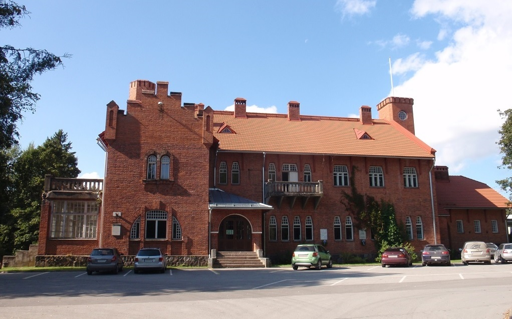 Jäneda mõisa peahoone idakülg